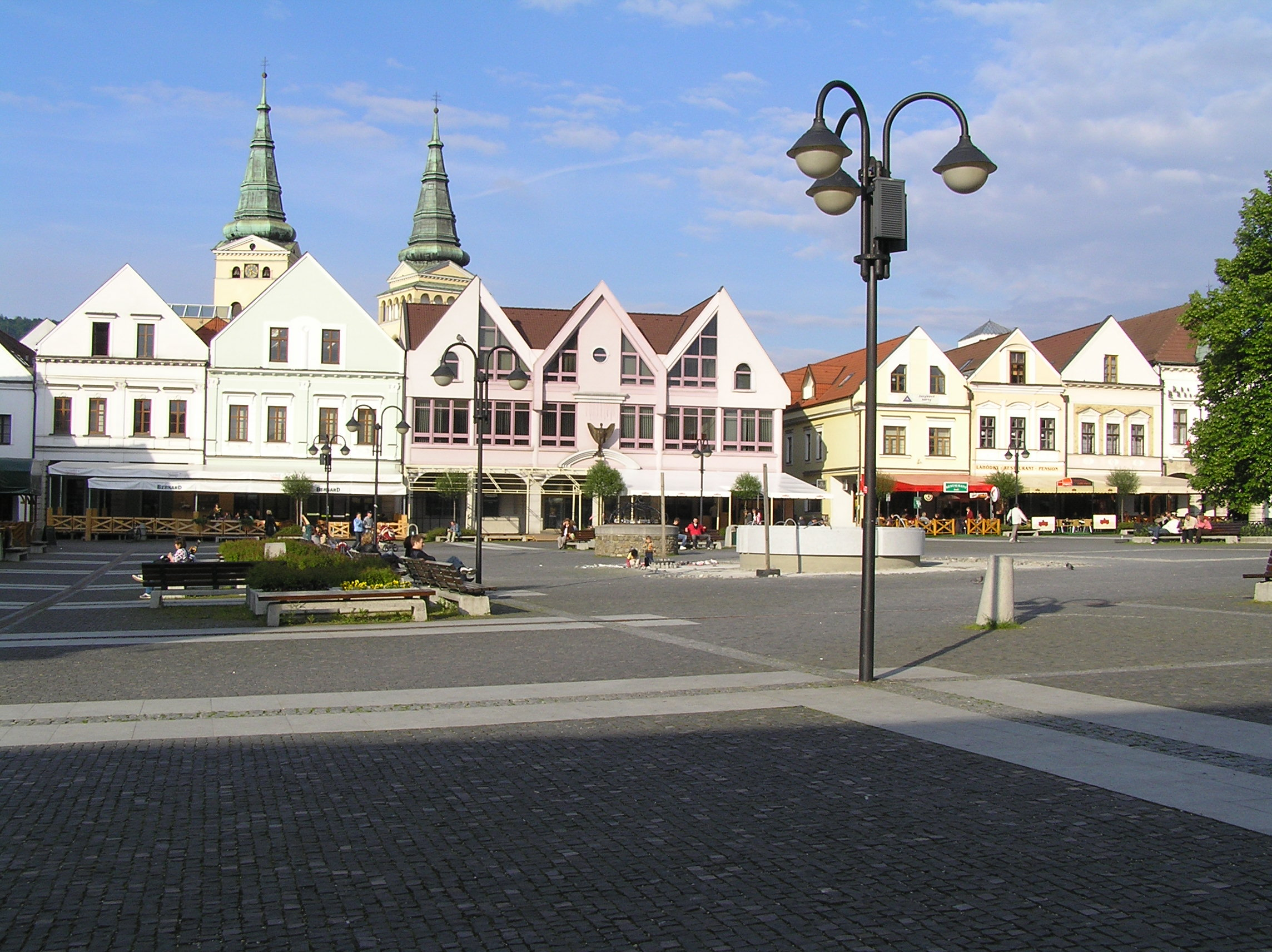 pohľad na juh Mariánske námestie, Žilina